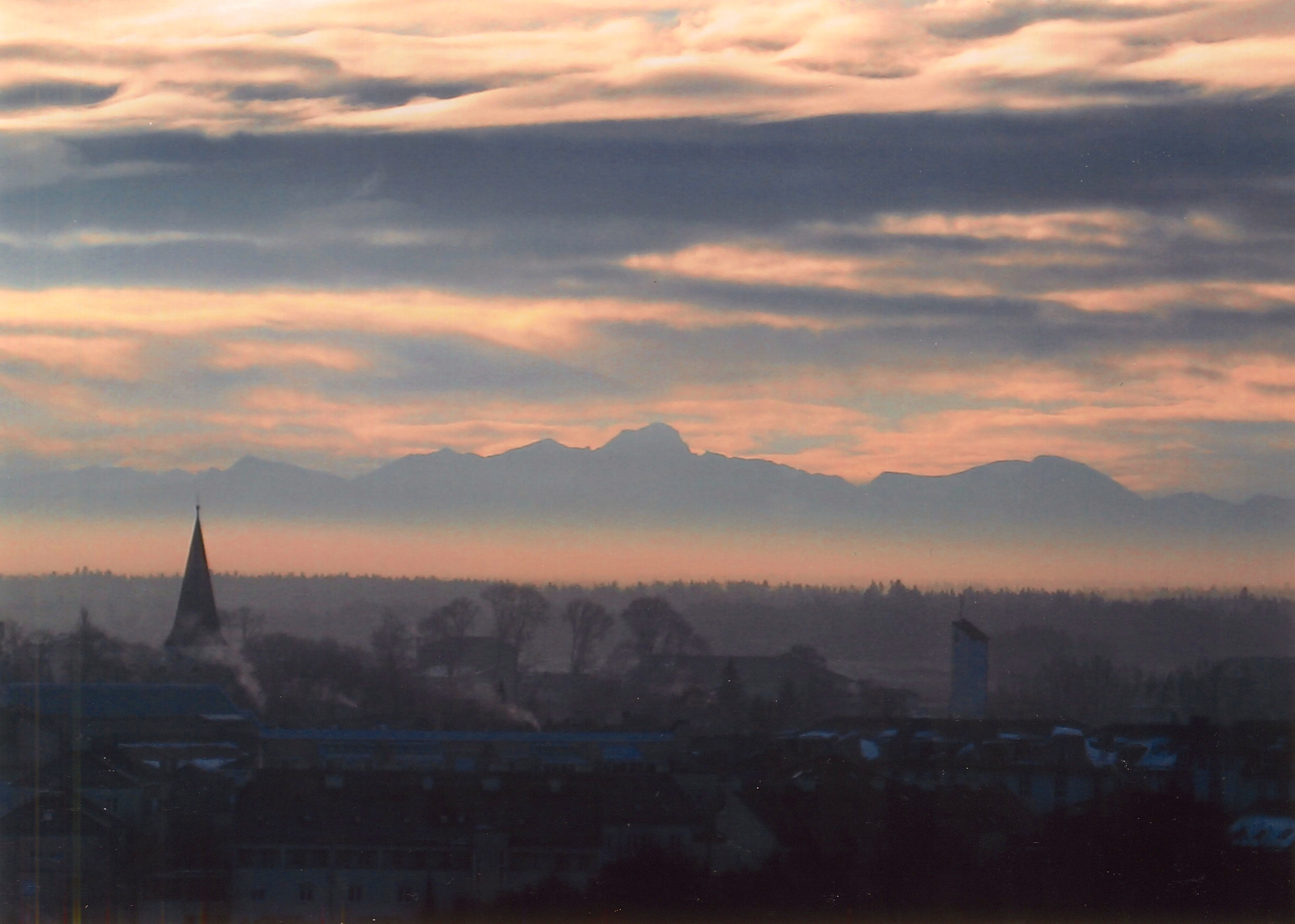 Taufkirchen. Winterliche Morgenstimmung